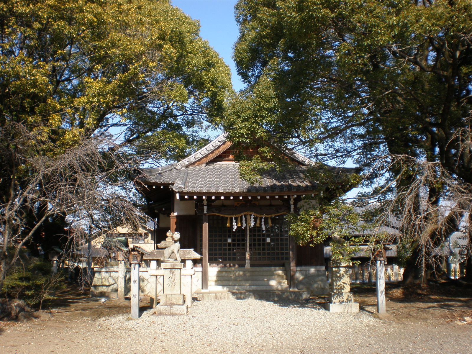 愛知県小牧市にある小牧神明社の別殿